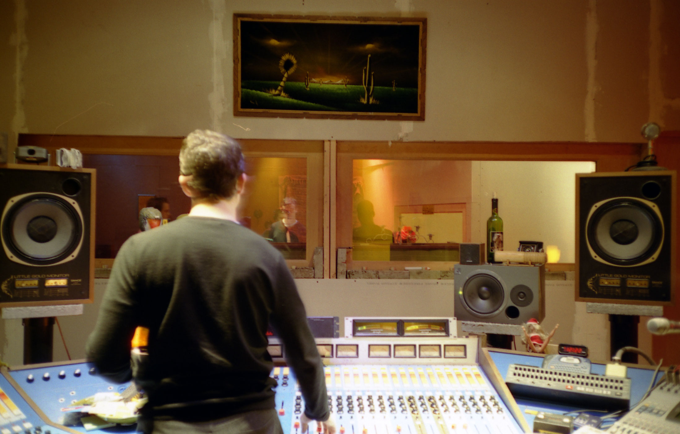 Tom-at-Desk